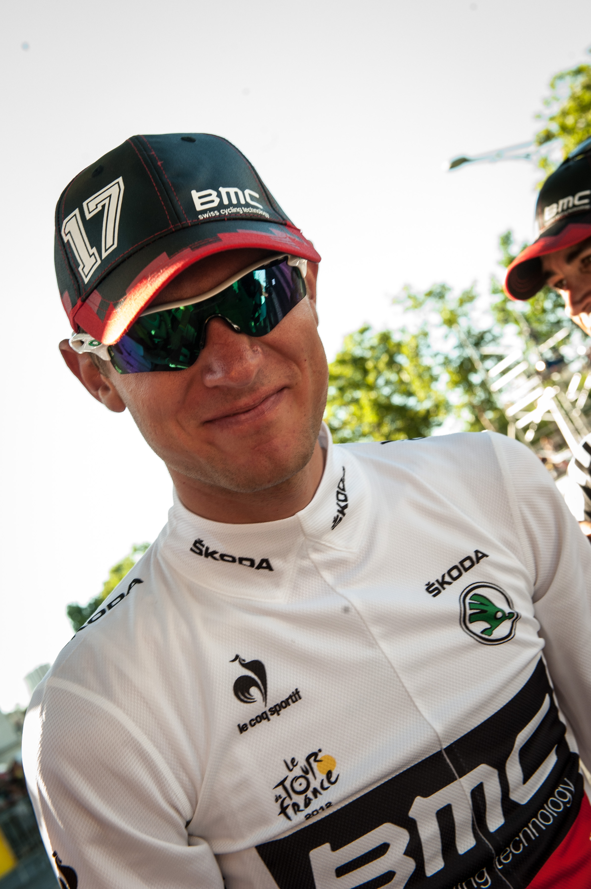 Tejay Van Garderen - 2012 Tour de France